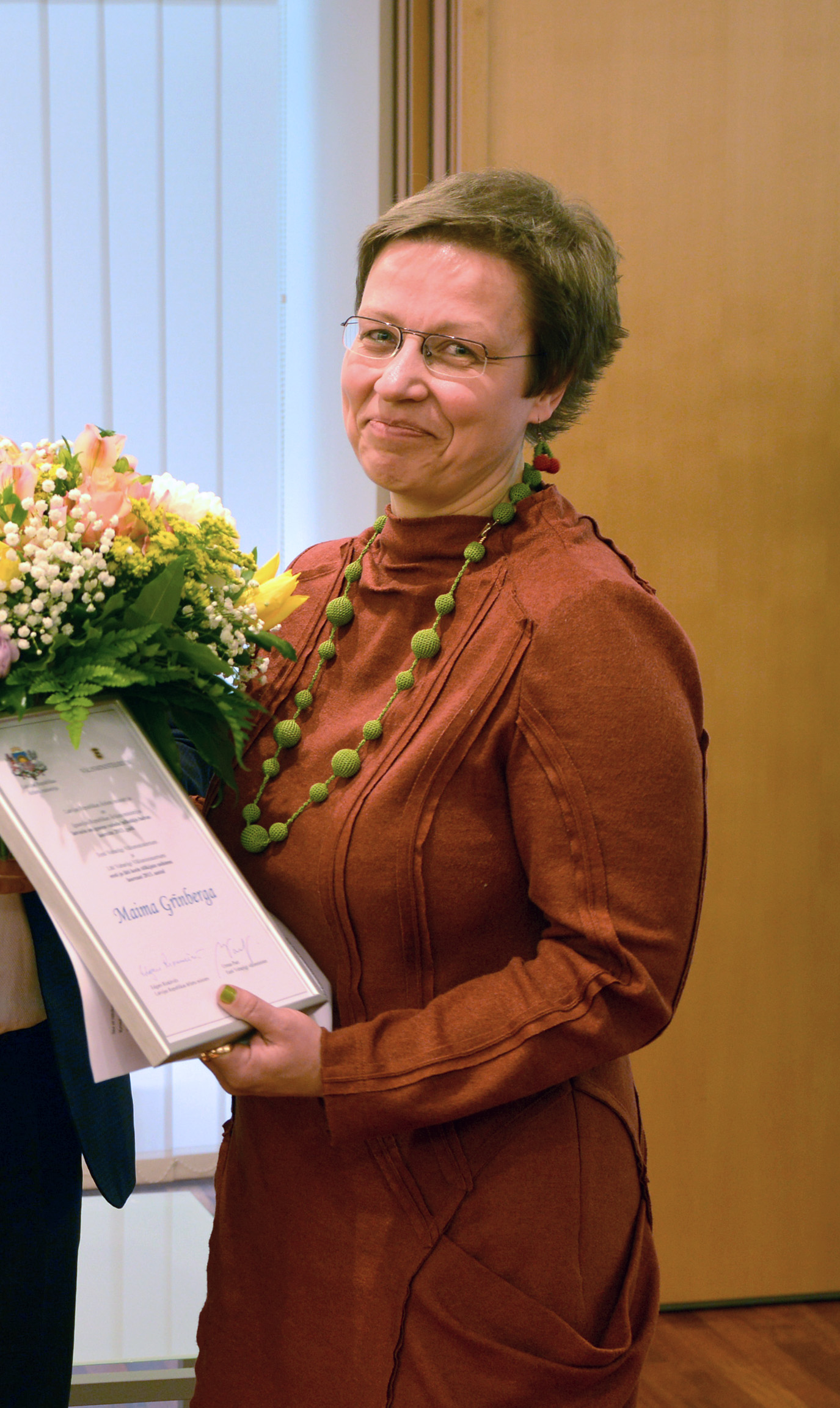 Maima Grīnberga Eesti-Läti ja Läti-Eesti tõlkeauhinna üleandmise tseremoonial